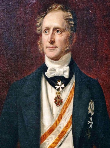 Adolf Heinrich von Arnim-Boitzenburg (1803-1868)